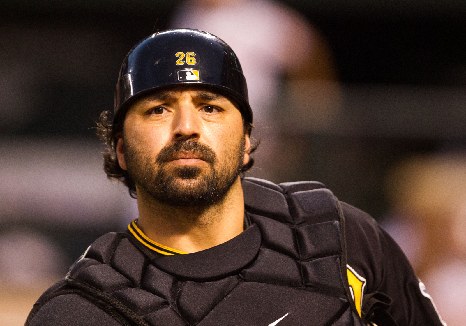 Rod Barajas